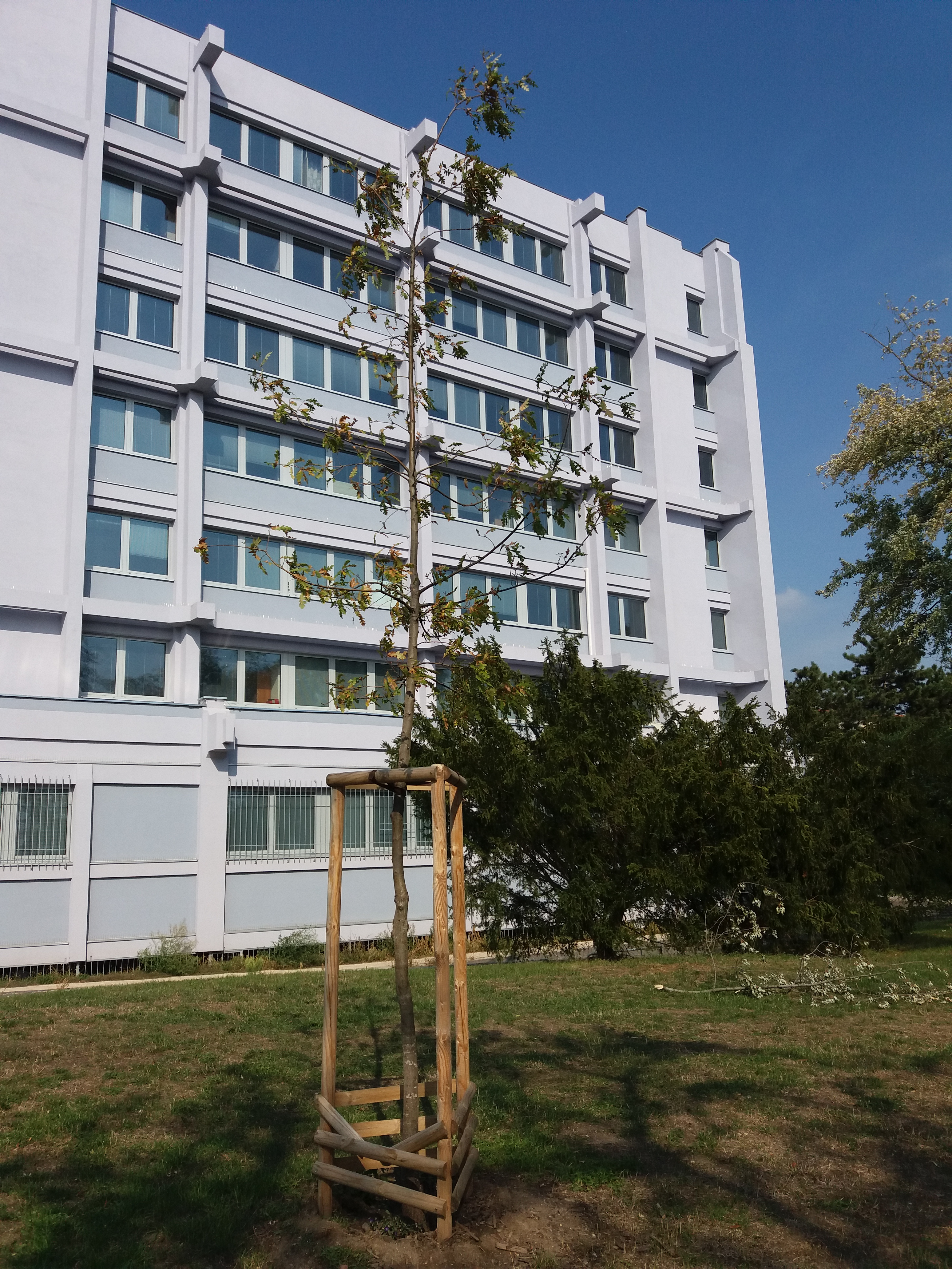 Strom Olgy Havlové.